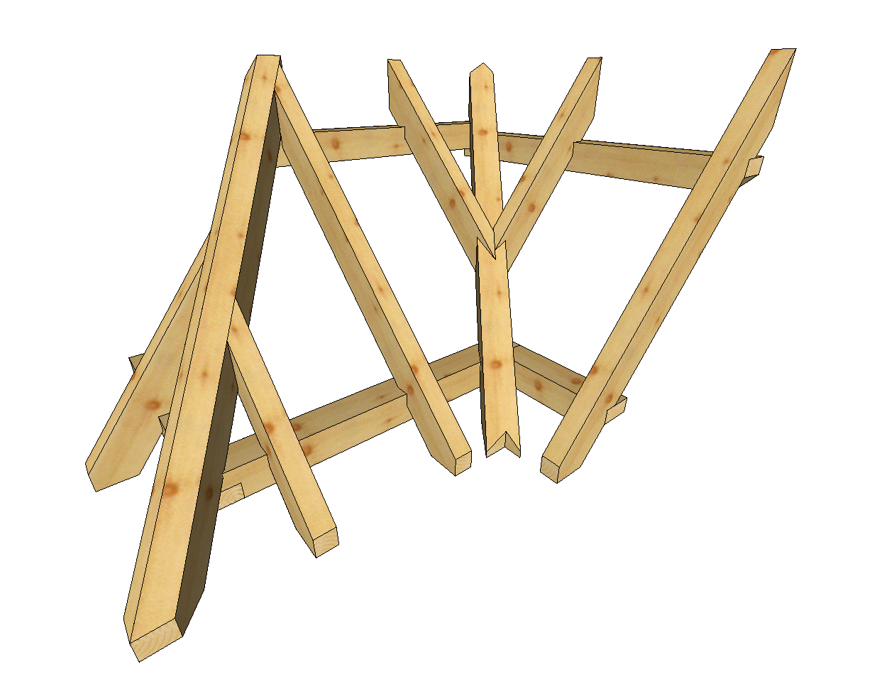 Walmecke mit Klauenschiftung; Ansicht von oben